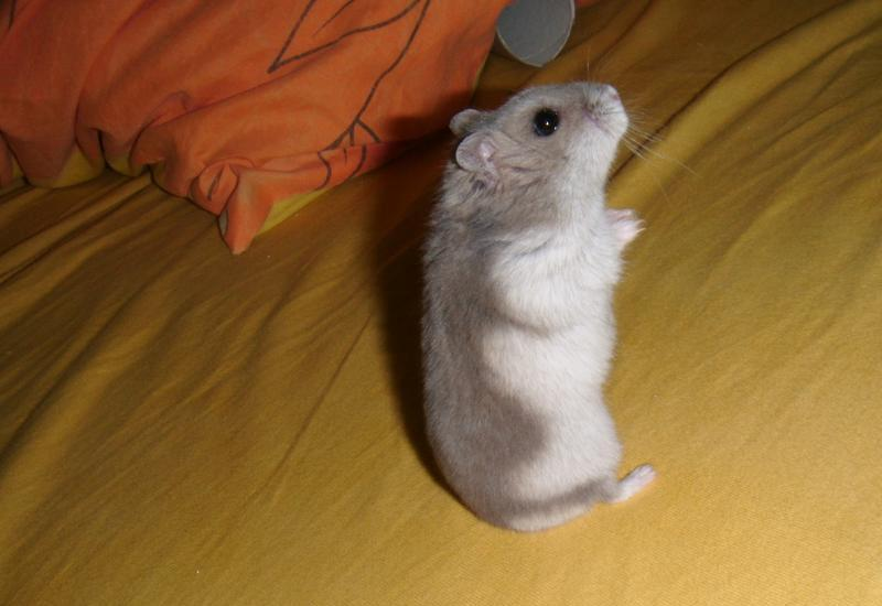 Chomik dżungarski - Świr